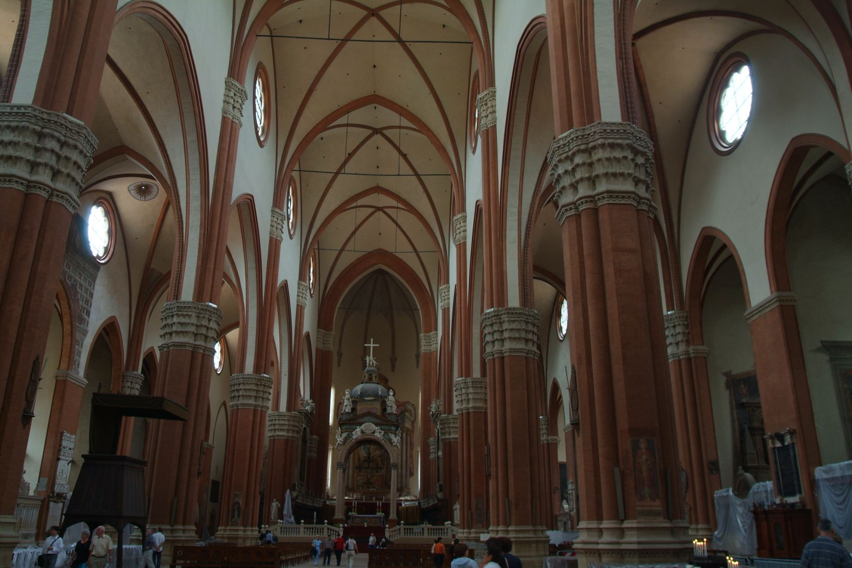 San Petronio